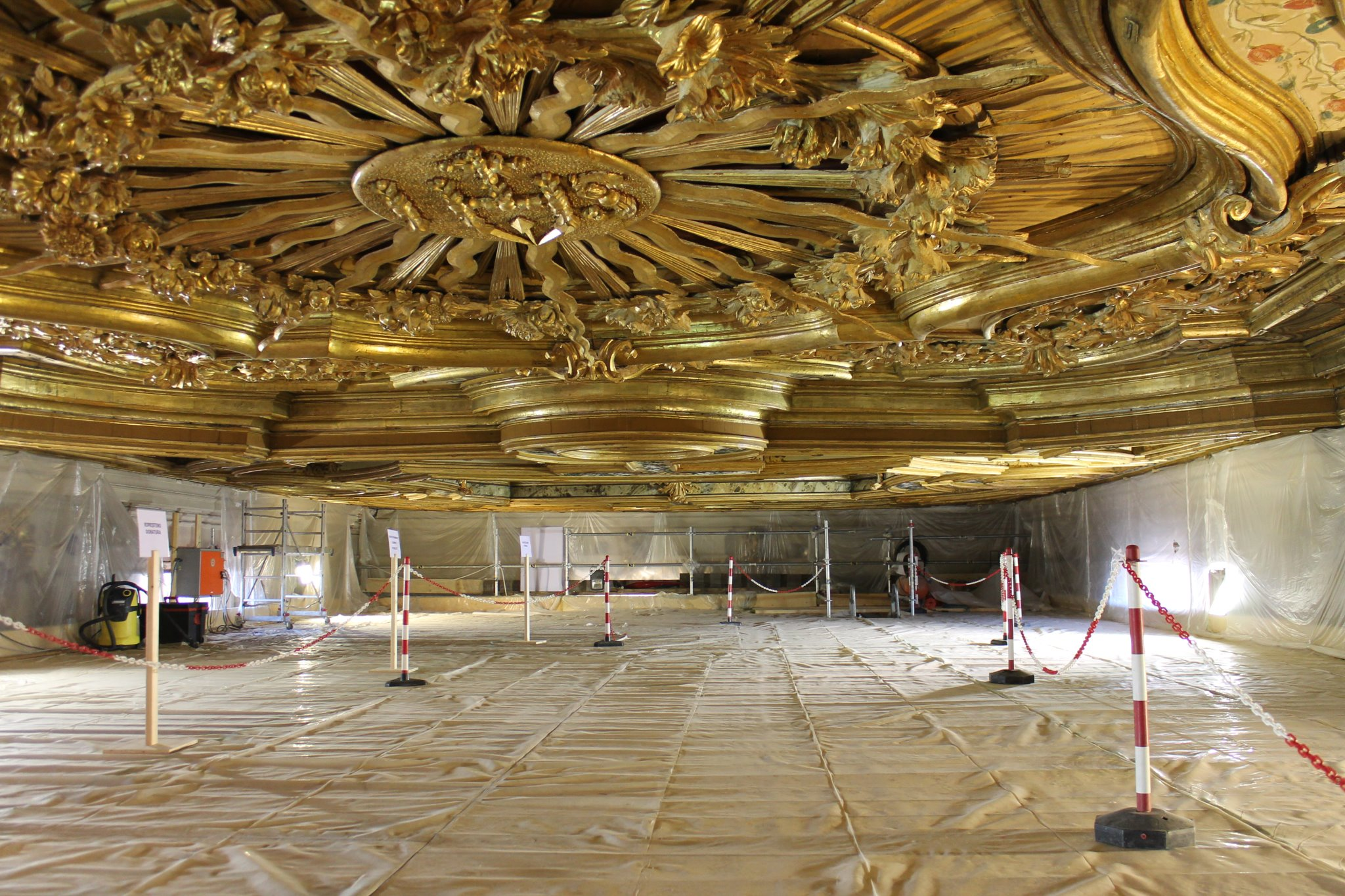 Il soffitto della basilica di San Bernardino durante il restauro (2011).